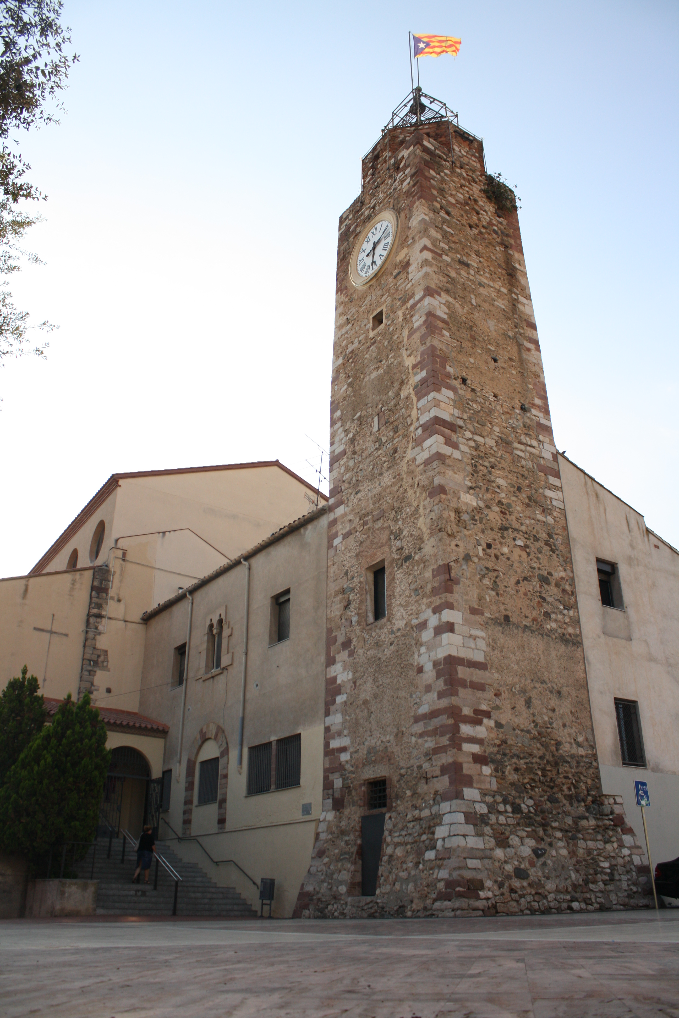 Església parroquial de Santa Maria (Olesa de Montserrat)